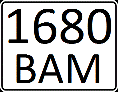 Мотоциклетный/прицепной номер Киргизии